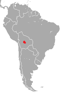 Distribución del Guacamayo Rubrogenys